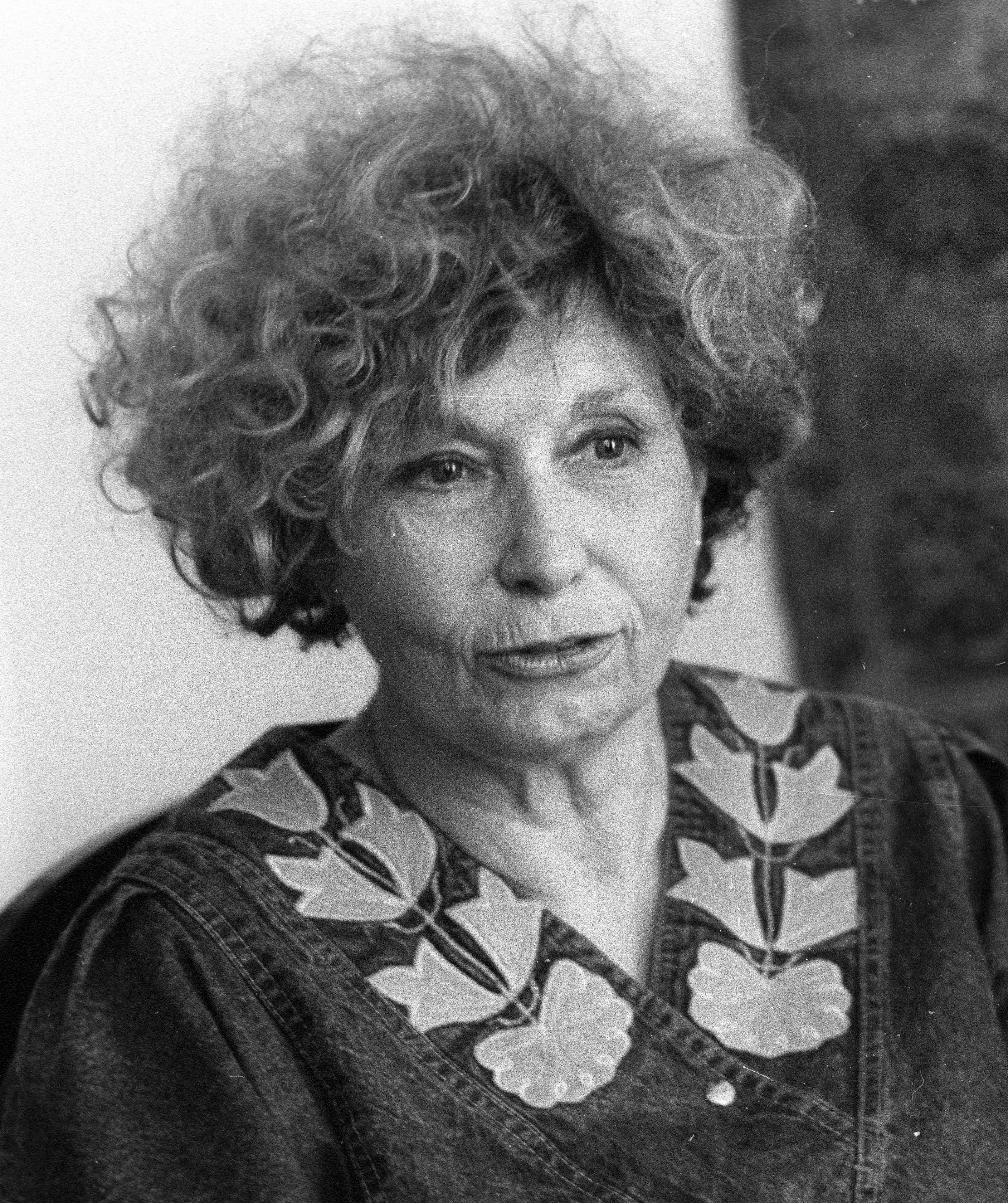 Schubert Éva színésznő